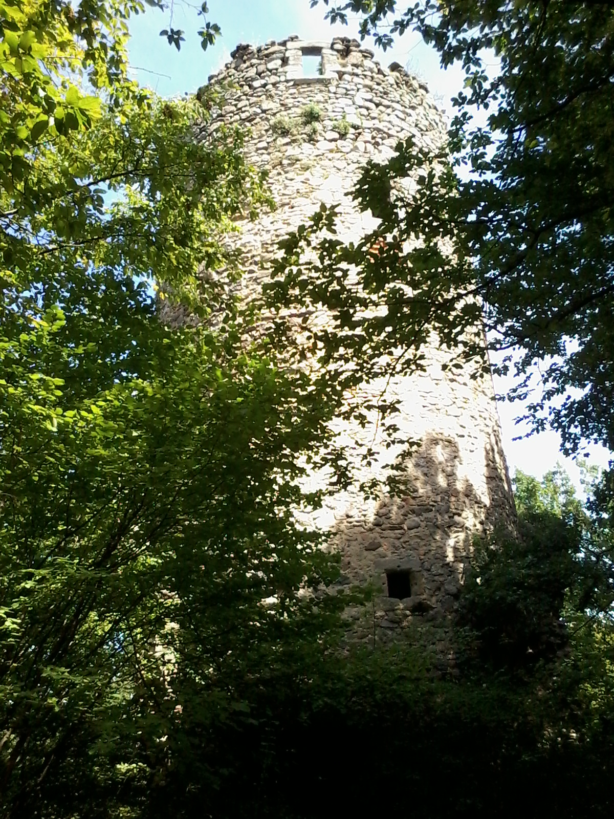 Vestige d'un château médiéval, la tour de Montléans se situe sur la commune de Jardin (Isère).